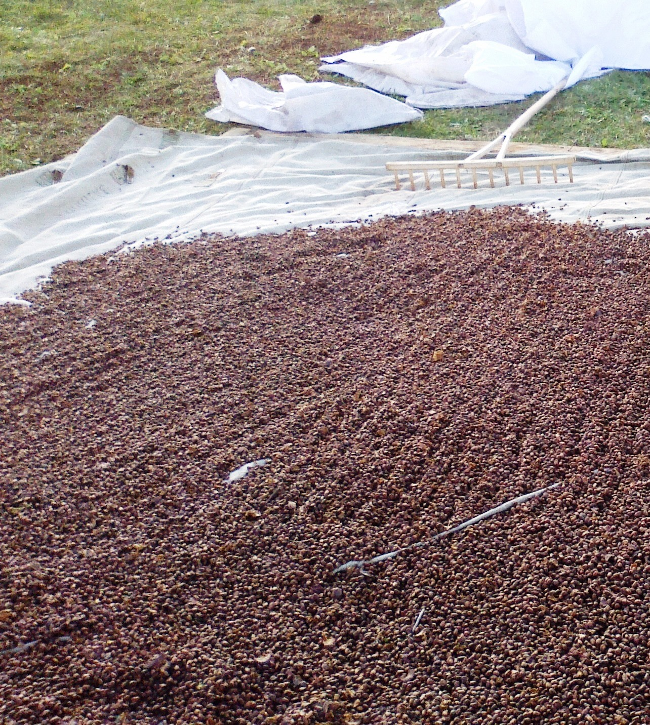 Drying of pine nuts